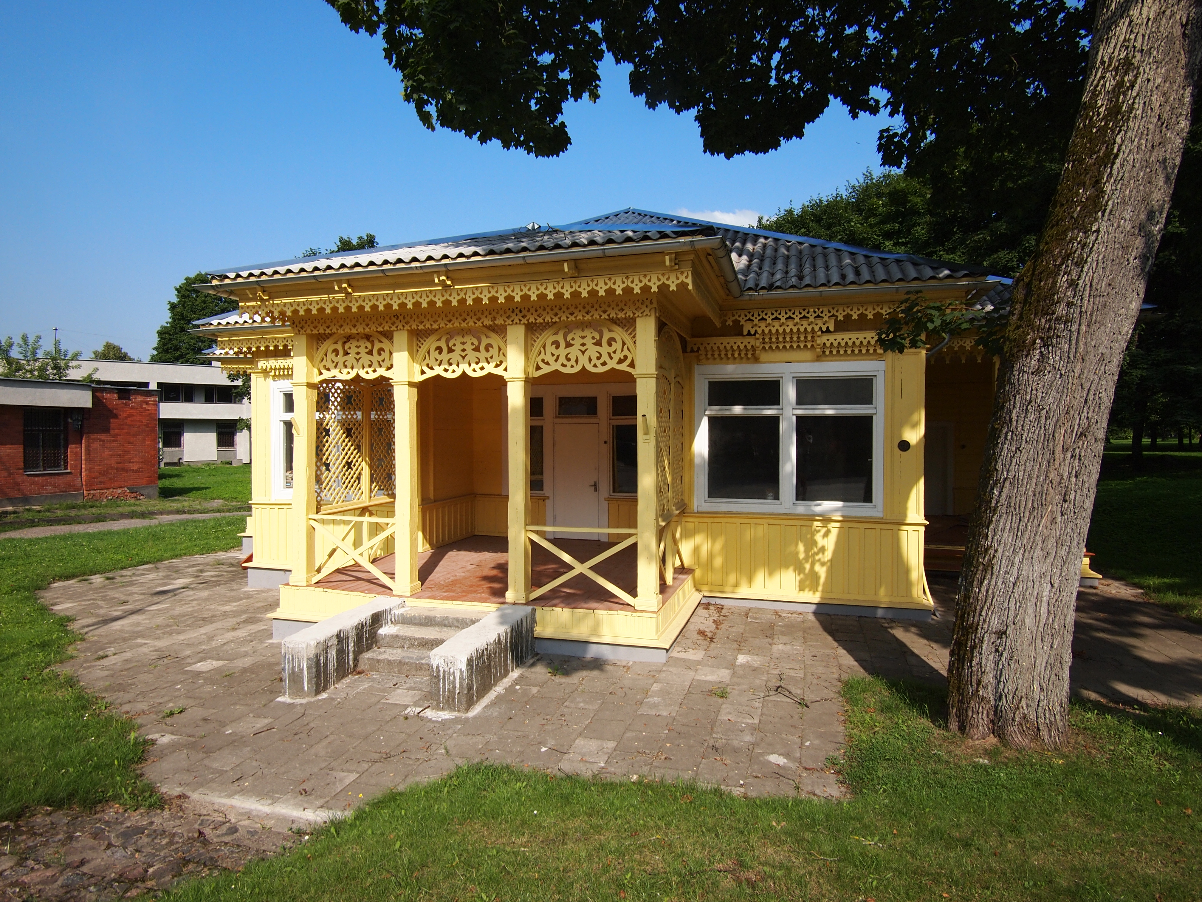 Druskininkai, Lithuania